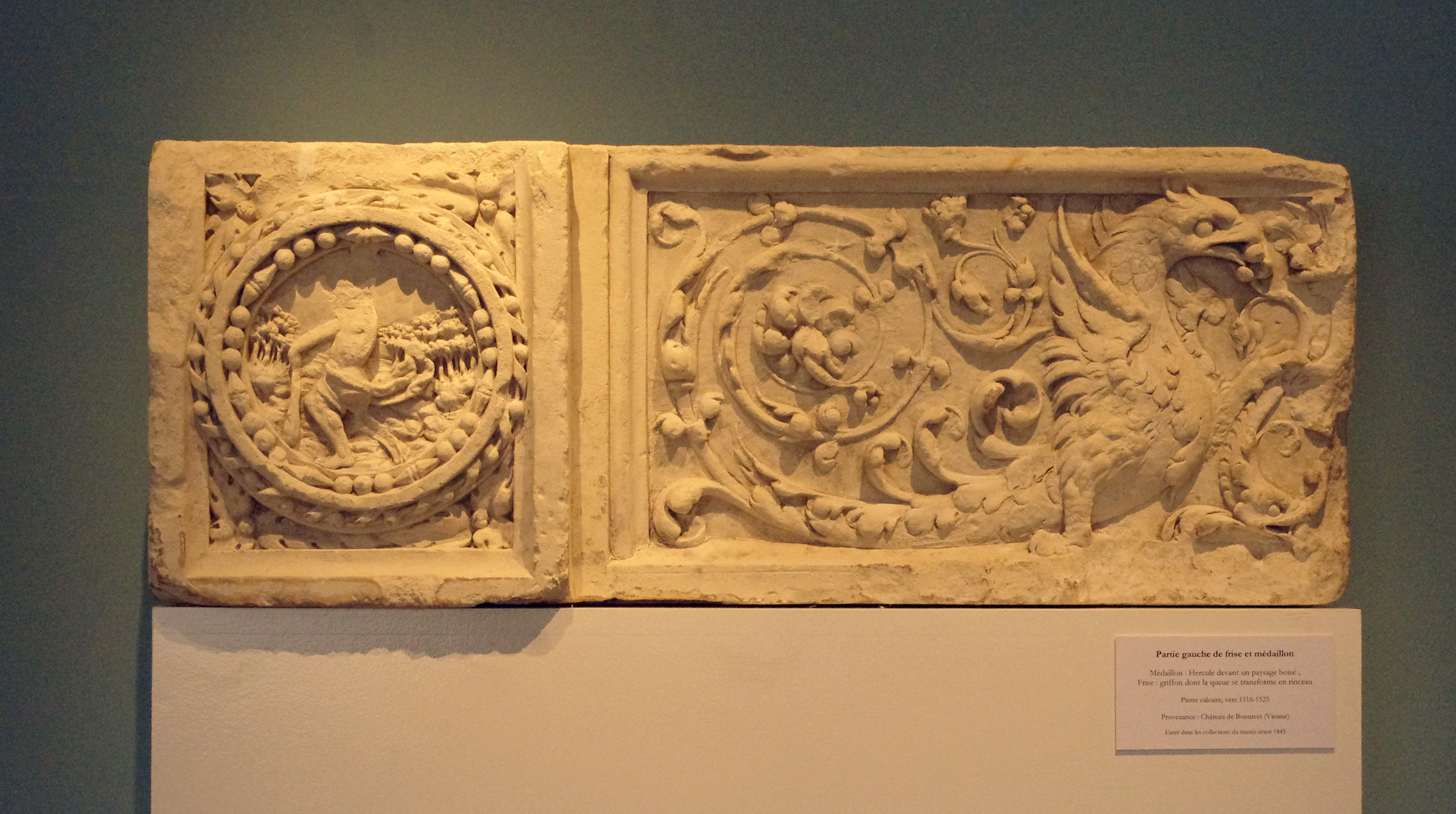 Bas relief provenant du château de Bonnivet, XVIe siècle, musée Sainte-Croix, Poitiers